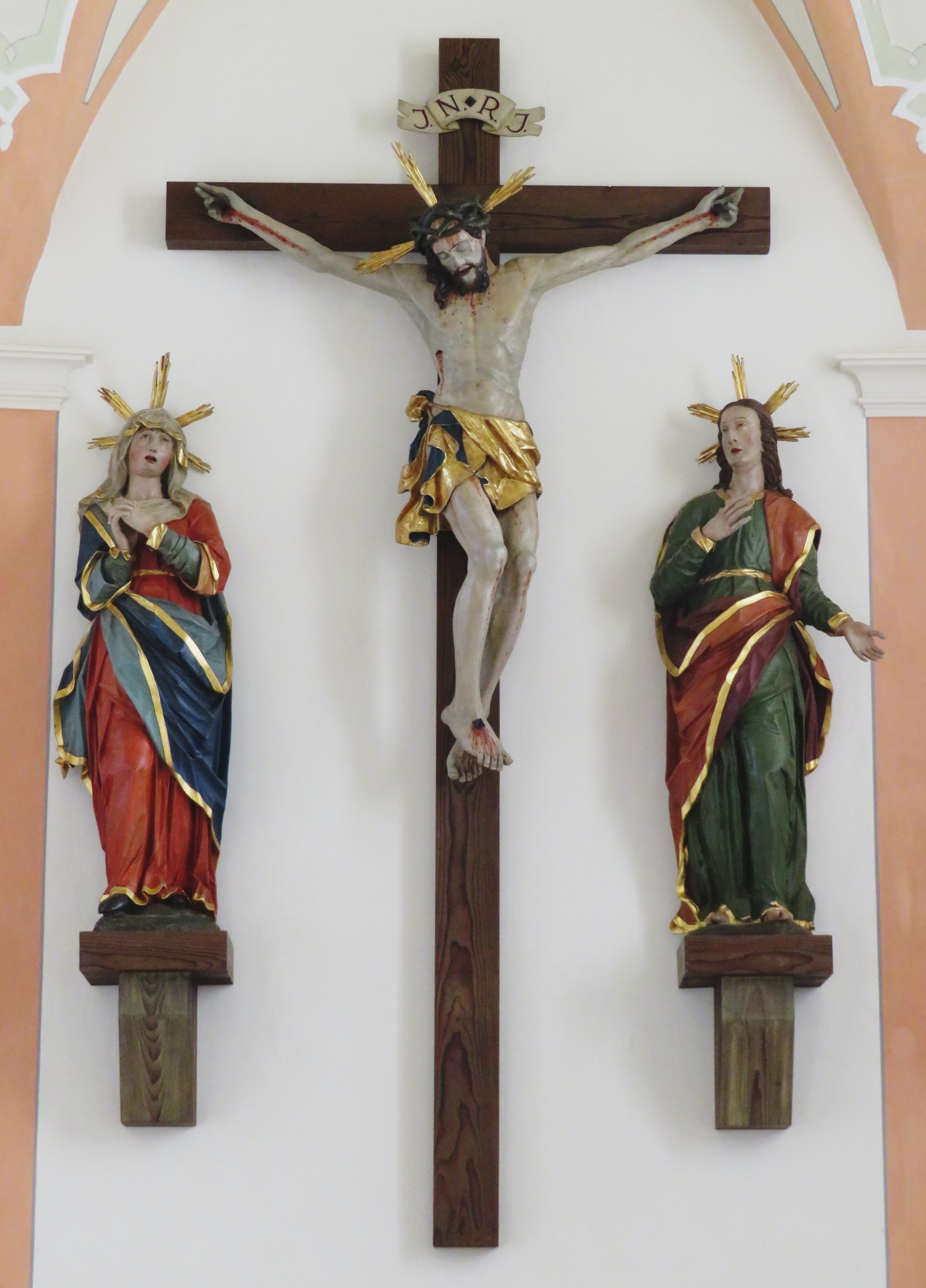 Kreuzigungsgruppe Chor kath. Pfarrkirche St. Martin Unterkirchberg